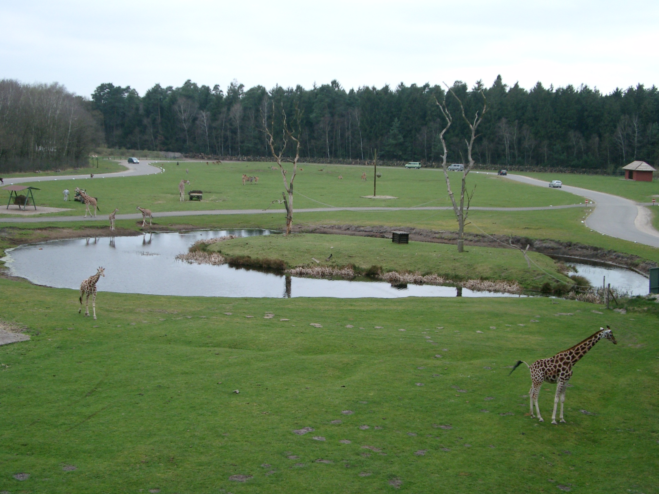 Giraffen in der ersten Sektion des Tierlandes im Serengeti-Park